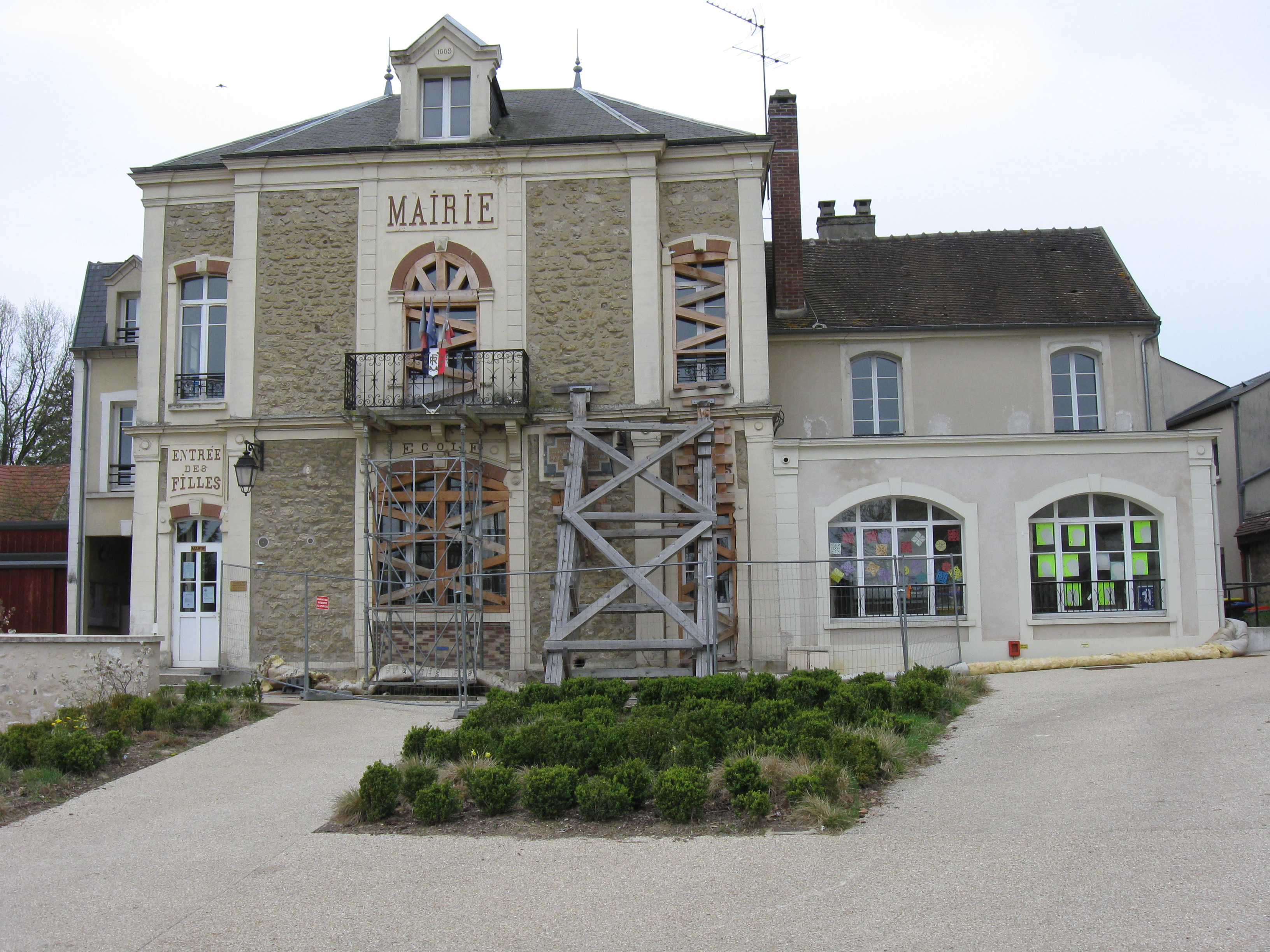 Mairie-école de Longuesse. (département du Val-d'Oise, région Île-de-France).